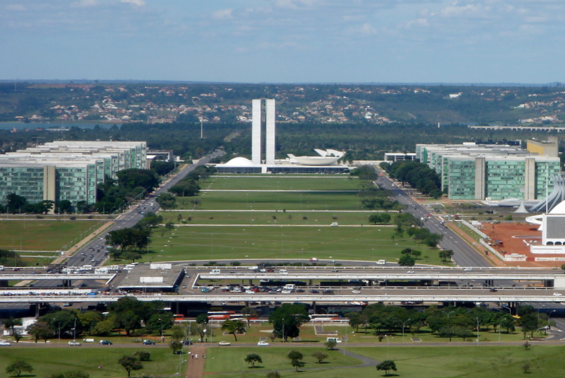 Esplanada dos Ministérios, Brasília, D.F.